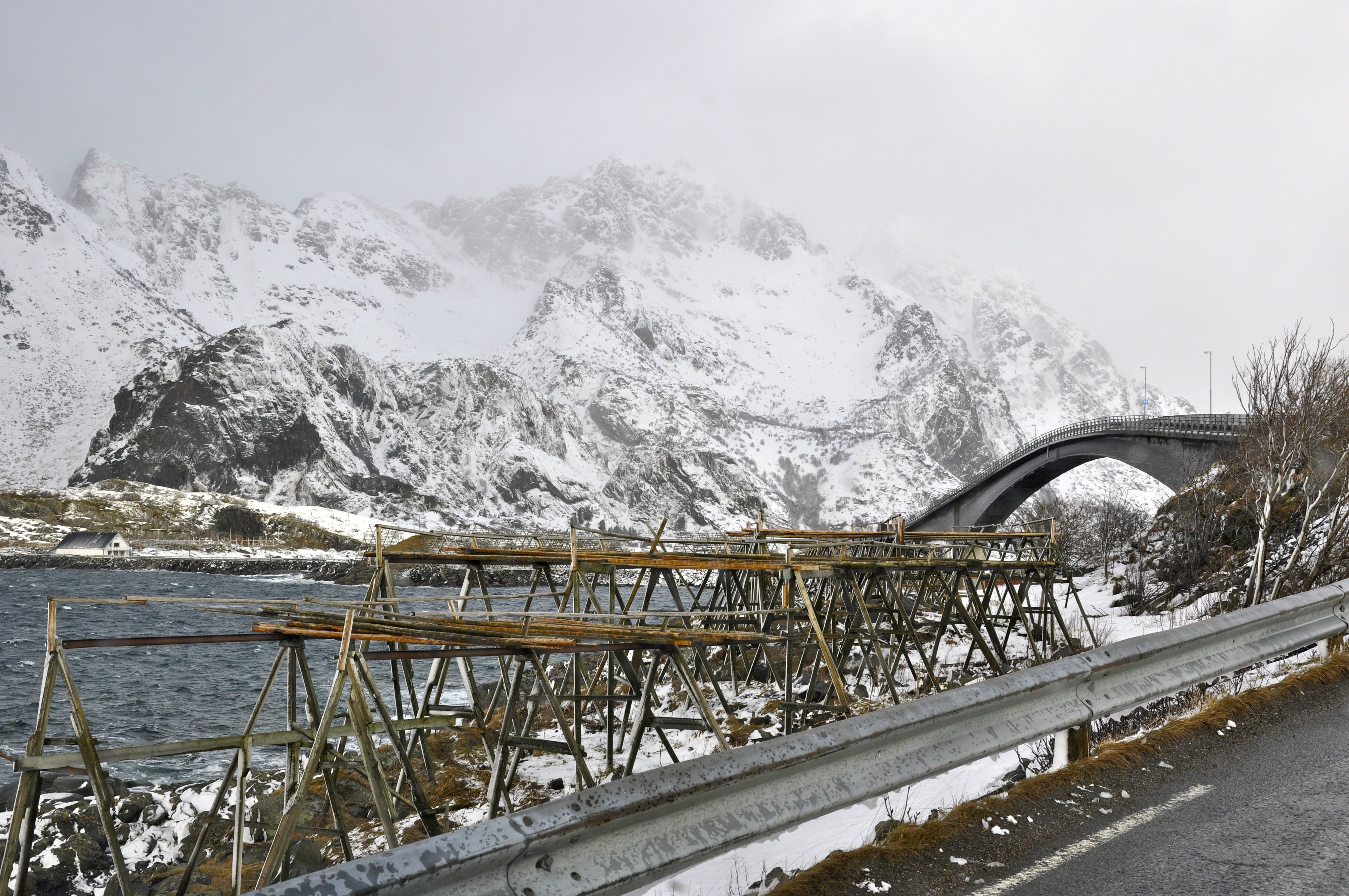 Henningsværbrua (bridge) in Henningsvær, Lofoten, Norway